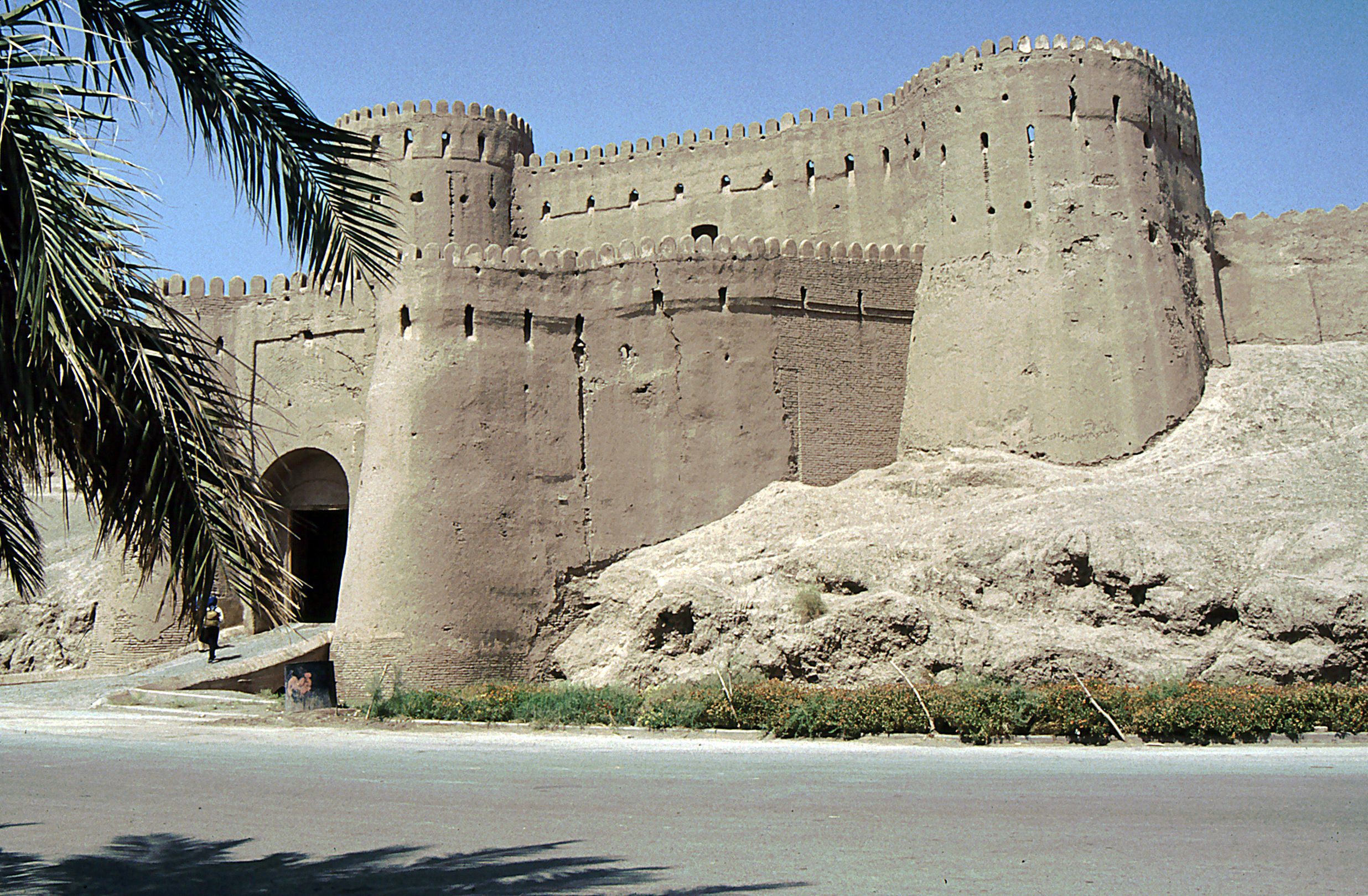 Stadttor von Bam